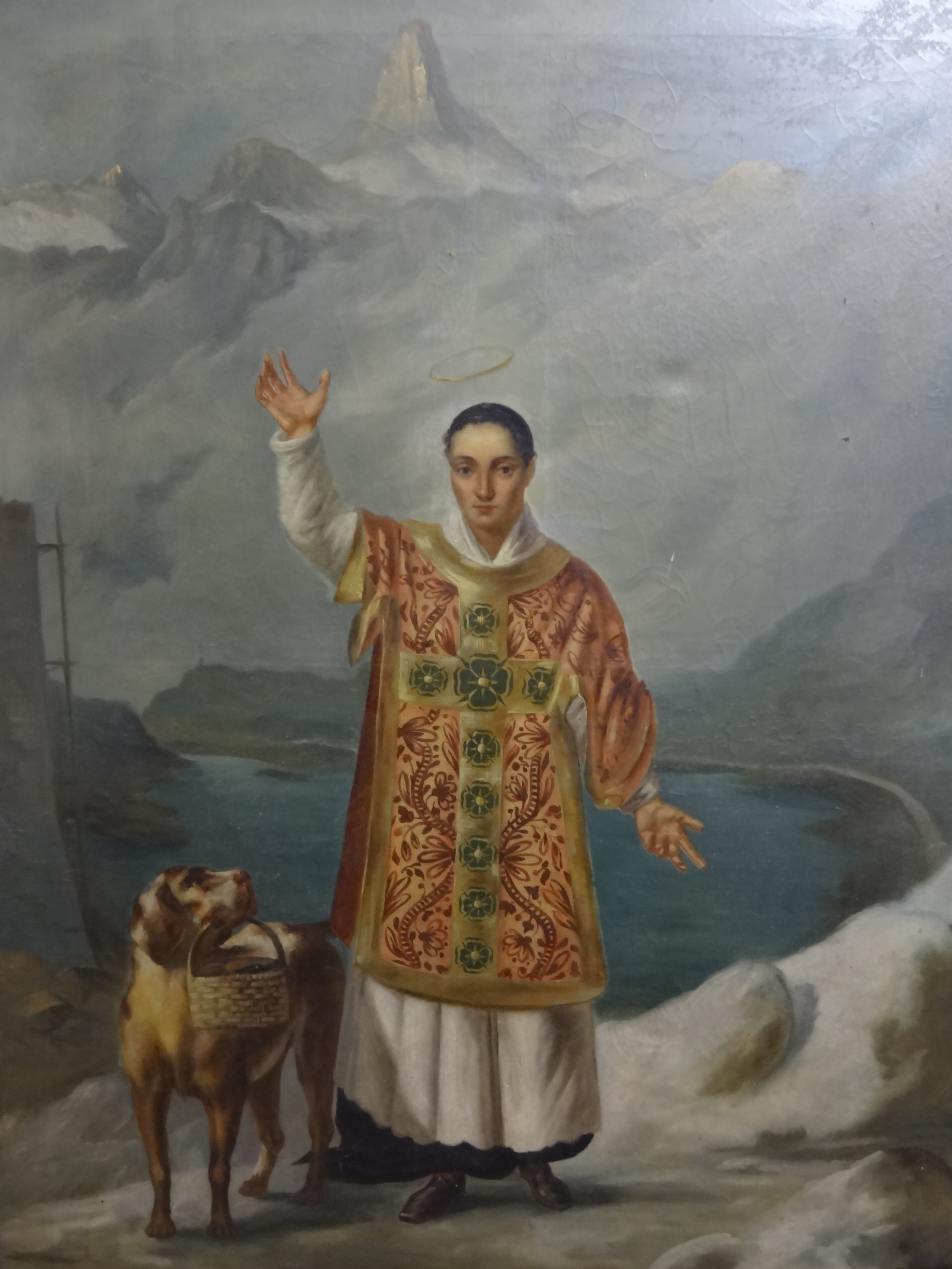 Tableau, 1832, autrefois à l'intérieur de l'église de l'hospice du Grand-Saint-Bernard, à l'entrée du choeur